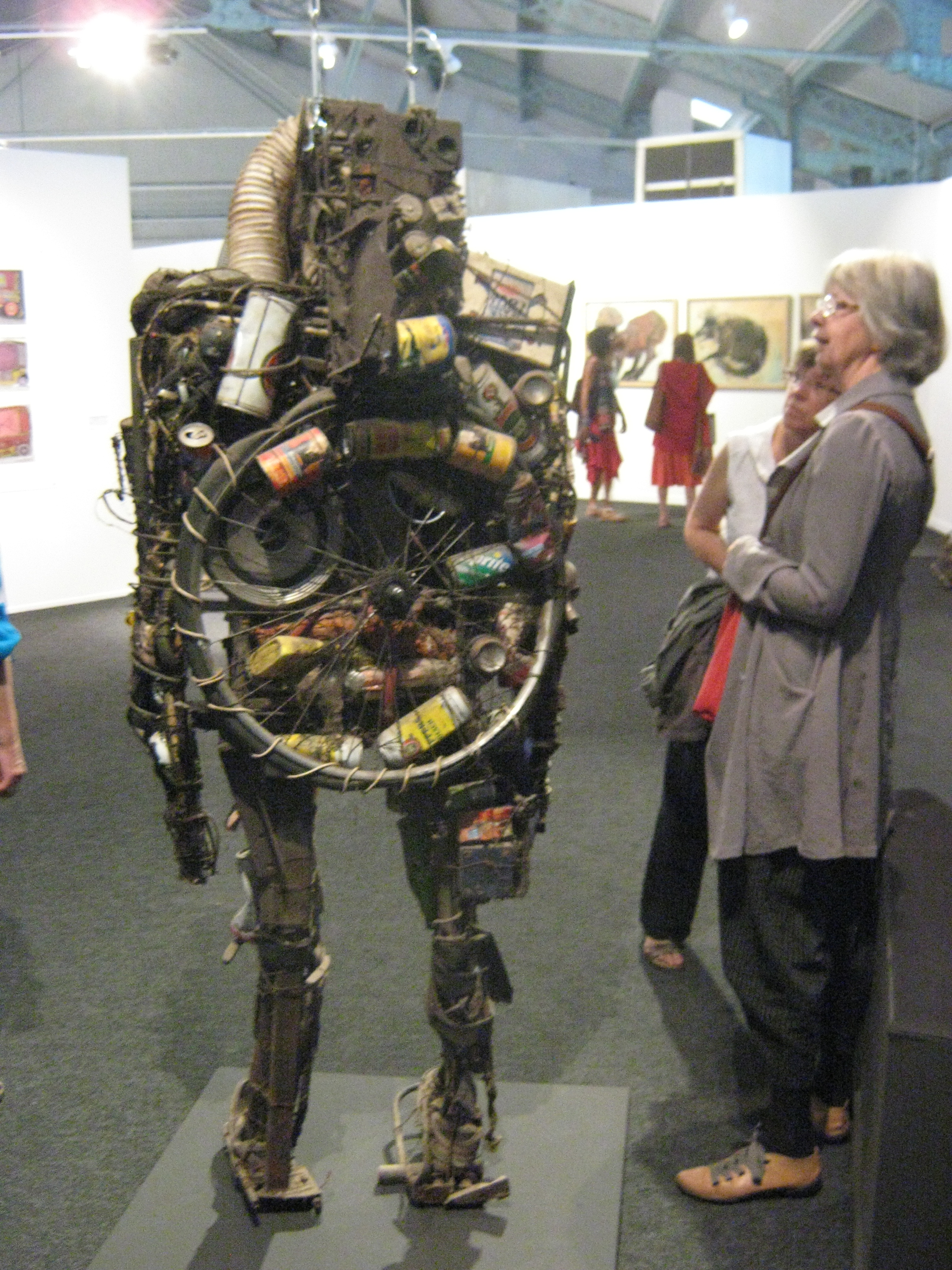 Ausstellungsbesucher vor einer Skulptur von Markus Meurer